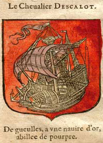 Chevalier Descalot